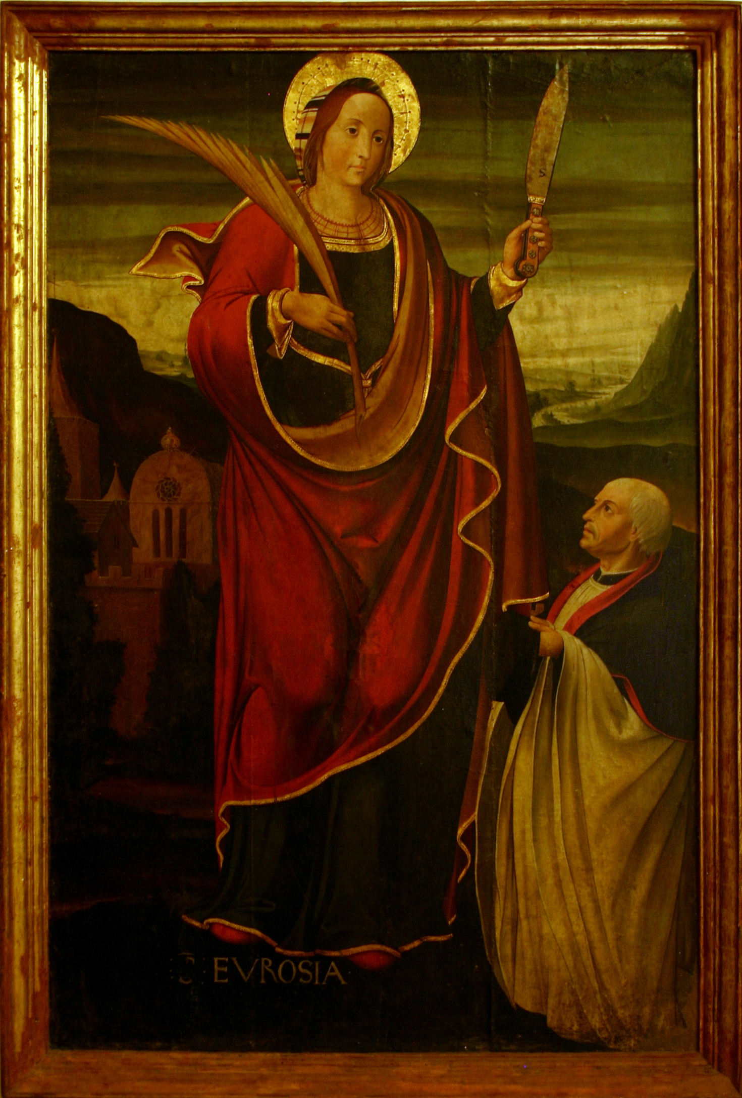 Museu da Catedral de Tarragona